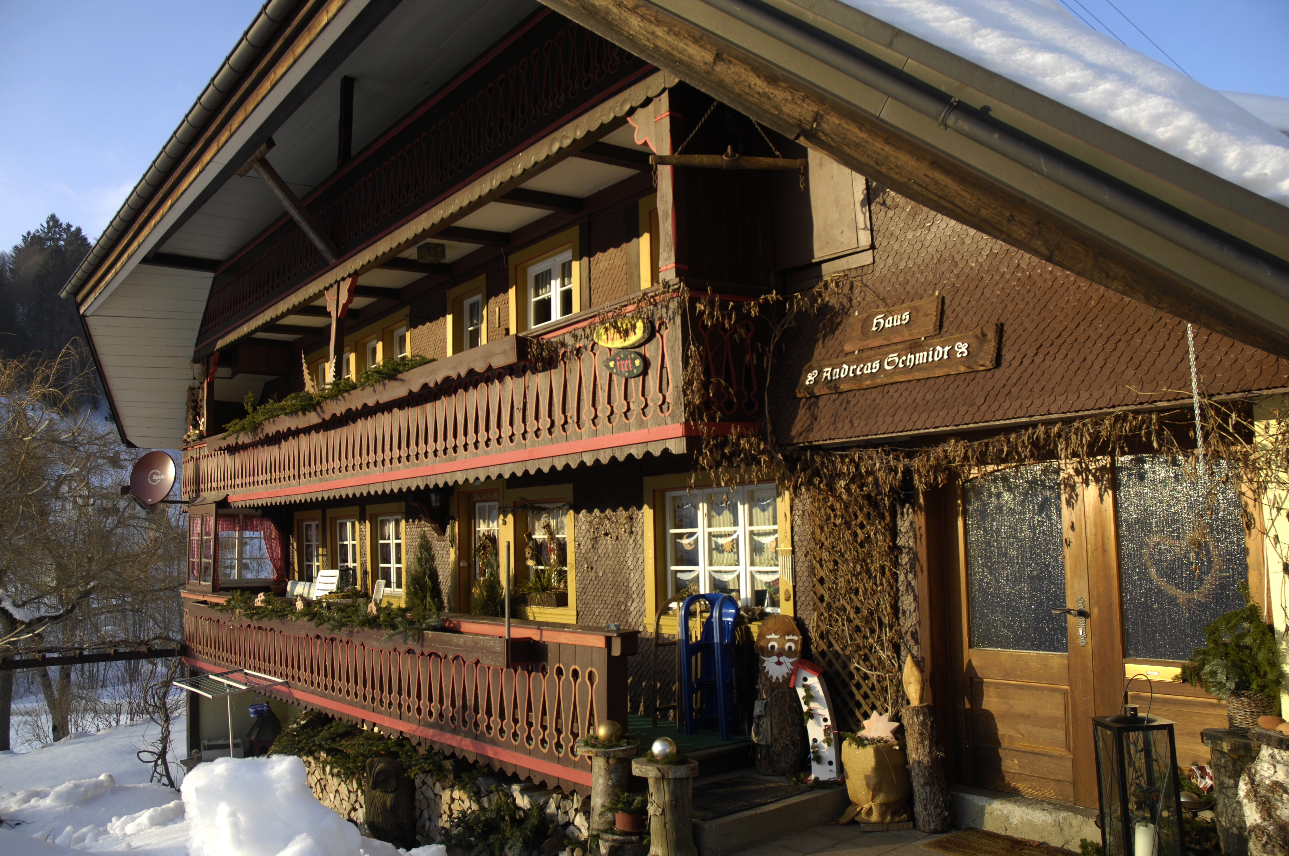 Typischer Schwarzwälder Hof der Familie Schmidt in Hintertodtmoos